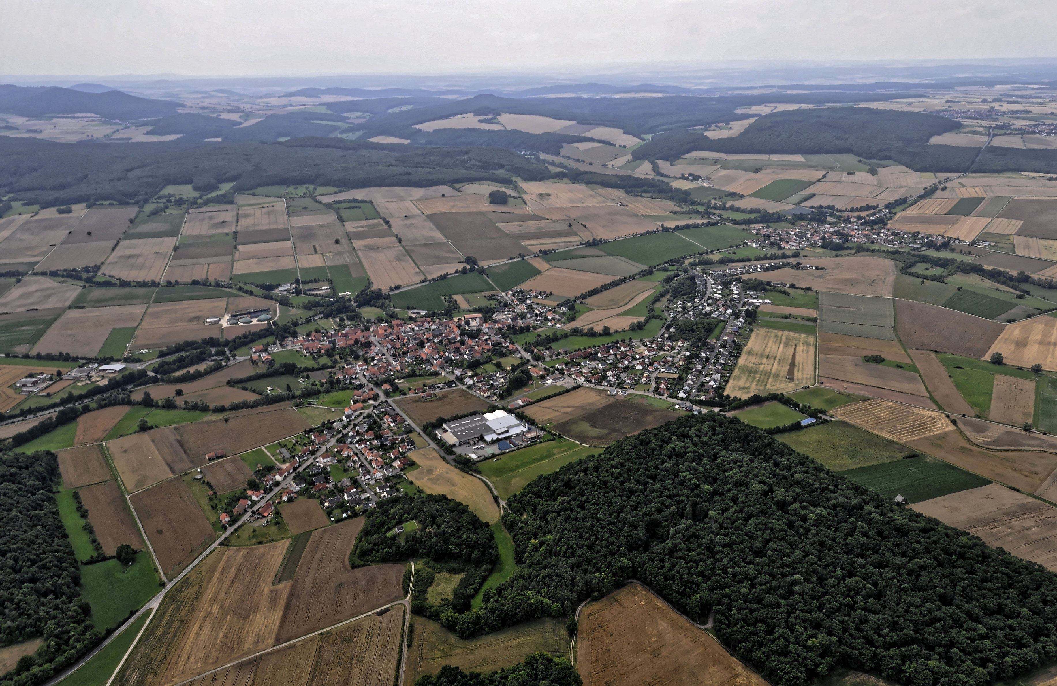 Bilder vom Flug Nordholz-Hammelburg 2015: Westuffeln